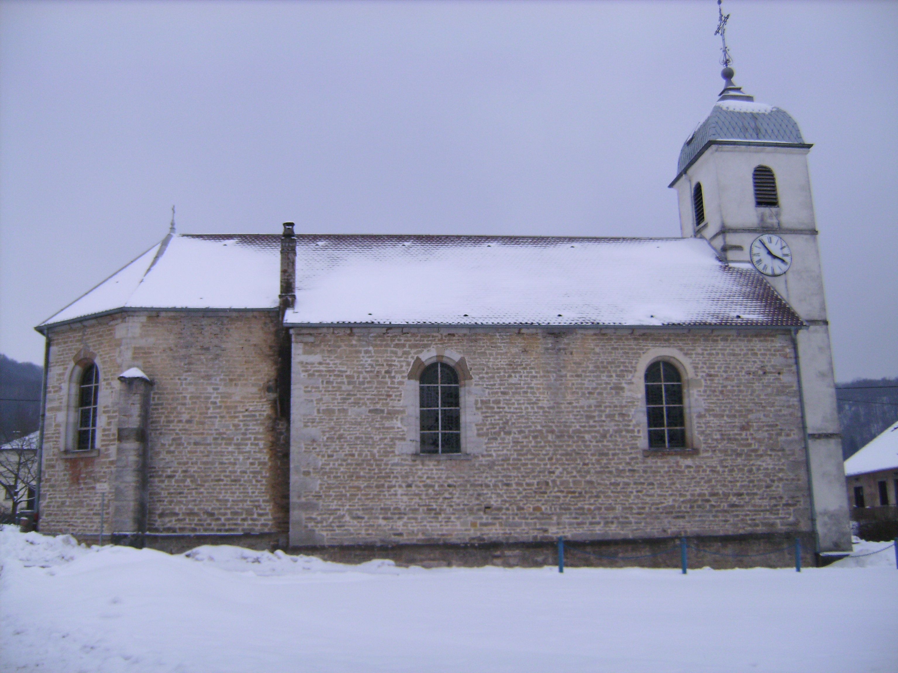 L'église de Rosières-sur-Barbèche.